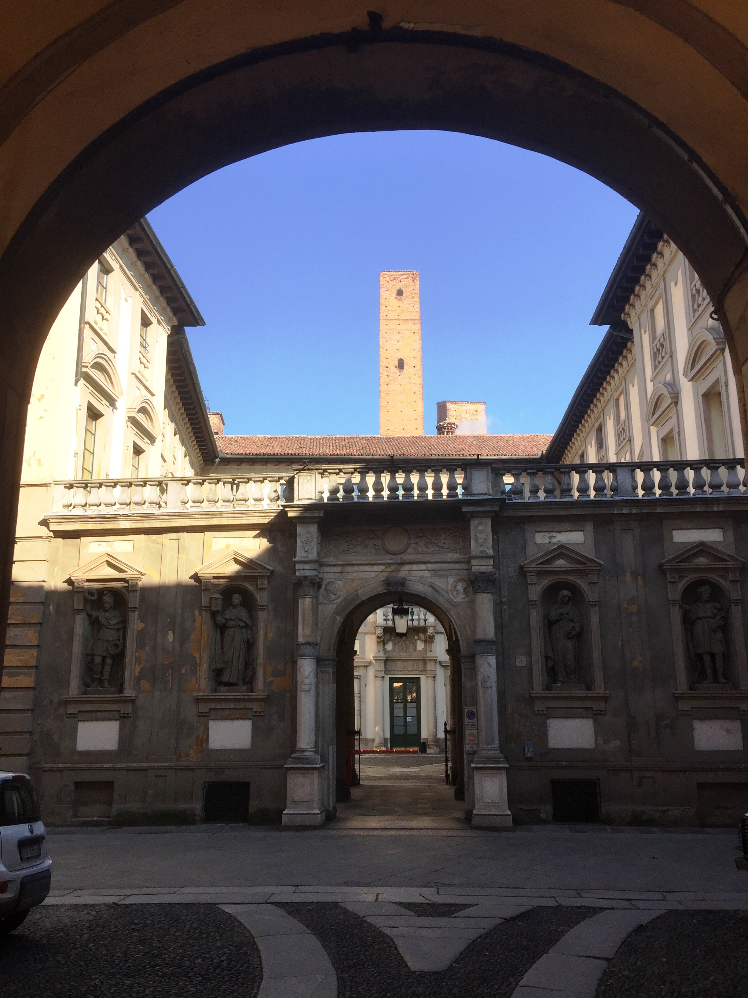 Pavia, Palazzo Del Maino